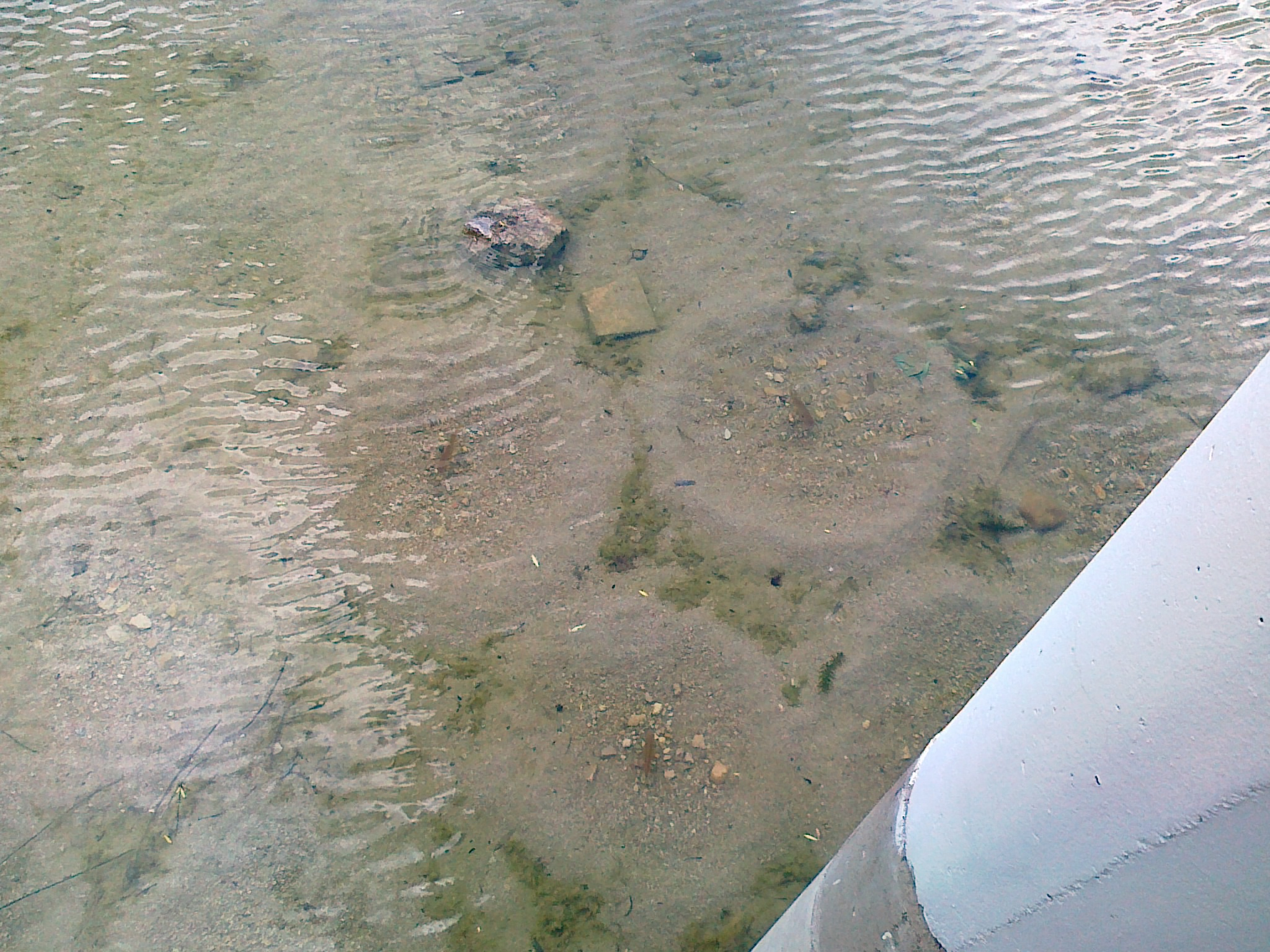 Nidos de percasol (Lepomis gibbosus) a final de primavera en el estanque de Tres Cantos. En el centro de cada circulo hay un percasol defendiendo su territorio